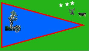 Bandera del Municipio Libertador